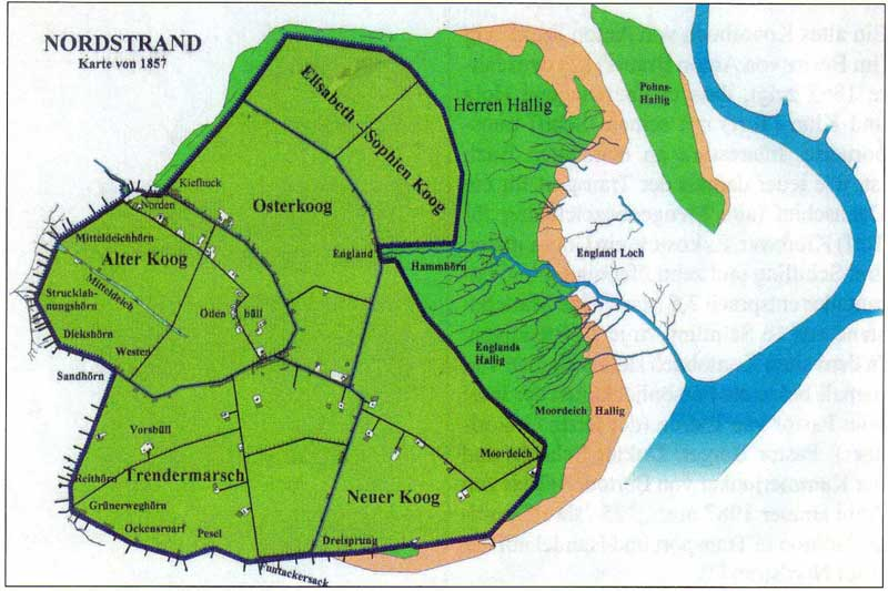 Karte der Insel Nordstrand, deutsche Nordseeküste